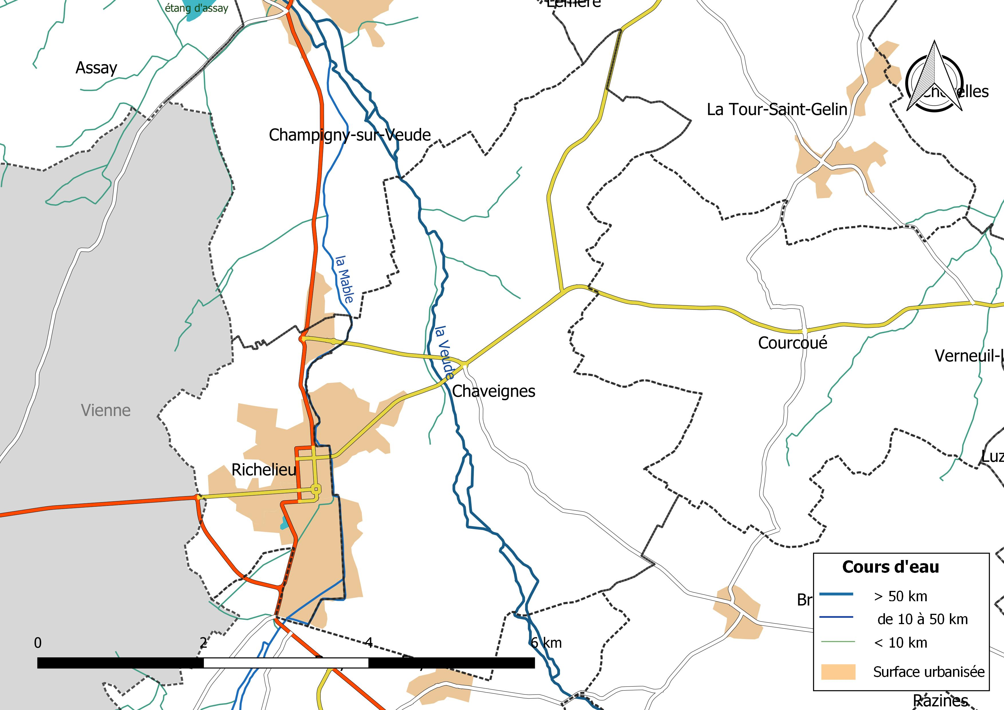 Carte du réseau hydrographique de la commune de Chaveignes (France).